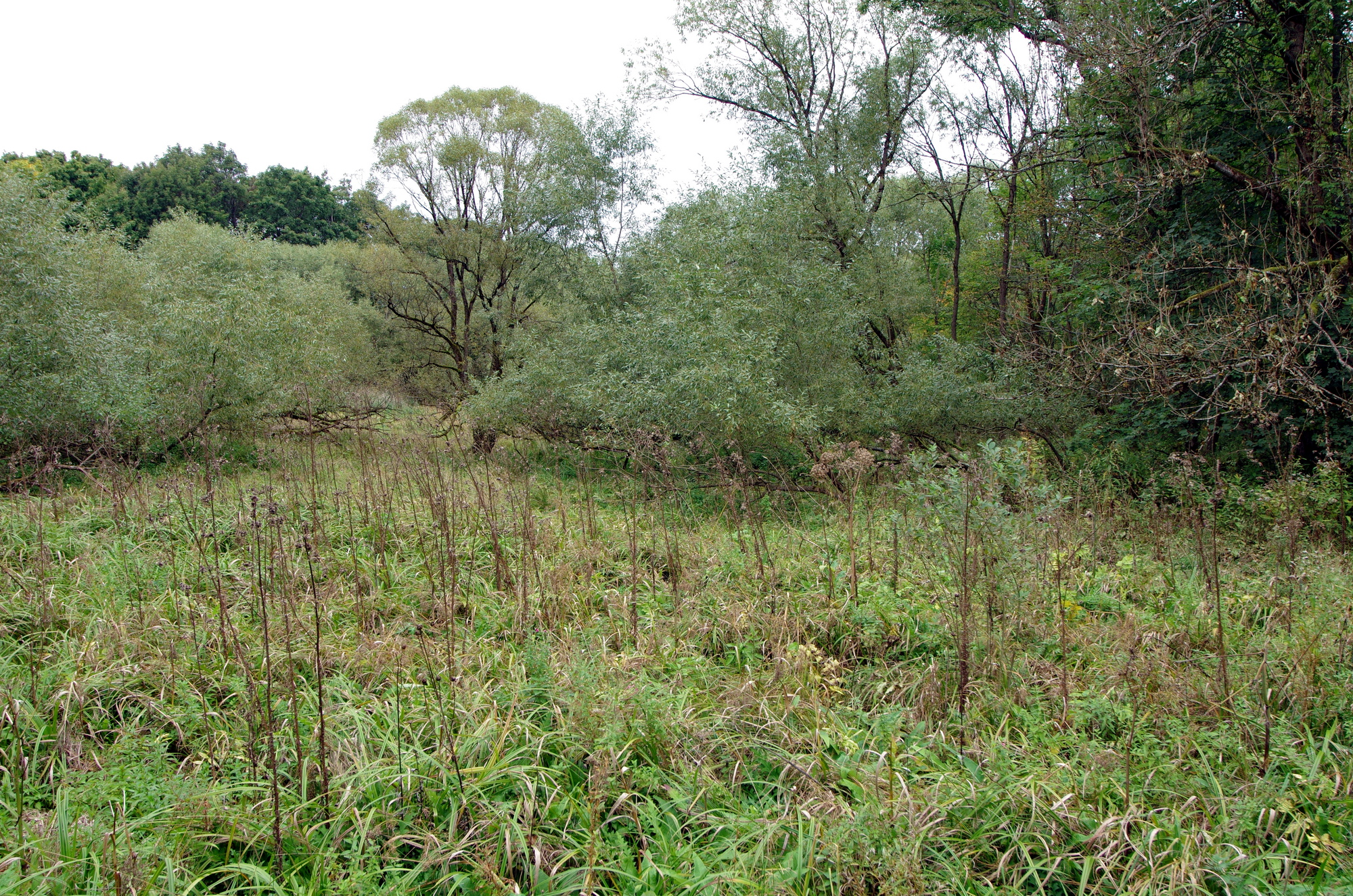 krajina v místě zaniklé obce Vranov u Rovné, Slavkovský les, okres Sokolov